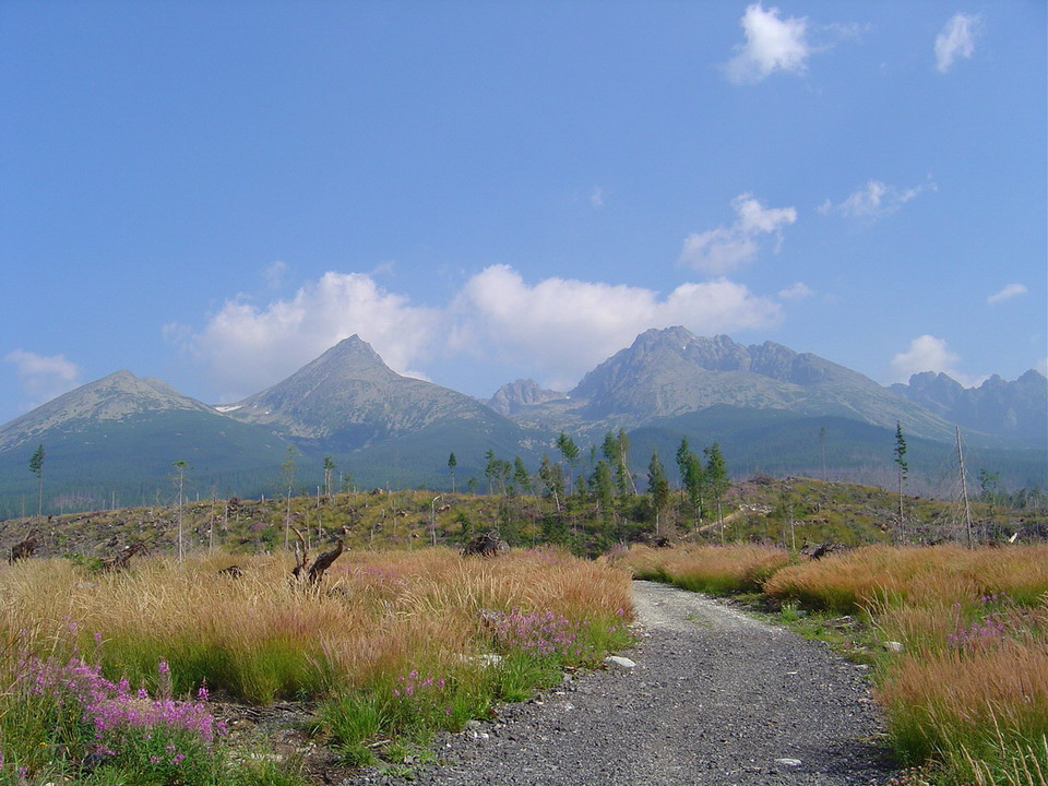 Klin (left), Končistá (middle) and Gerlachovský štít (right) from below Nová Polianka